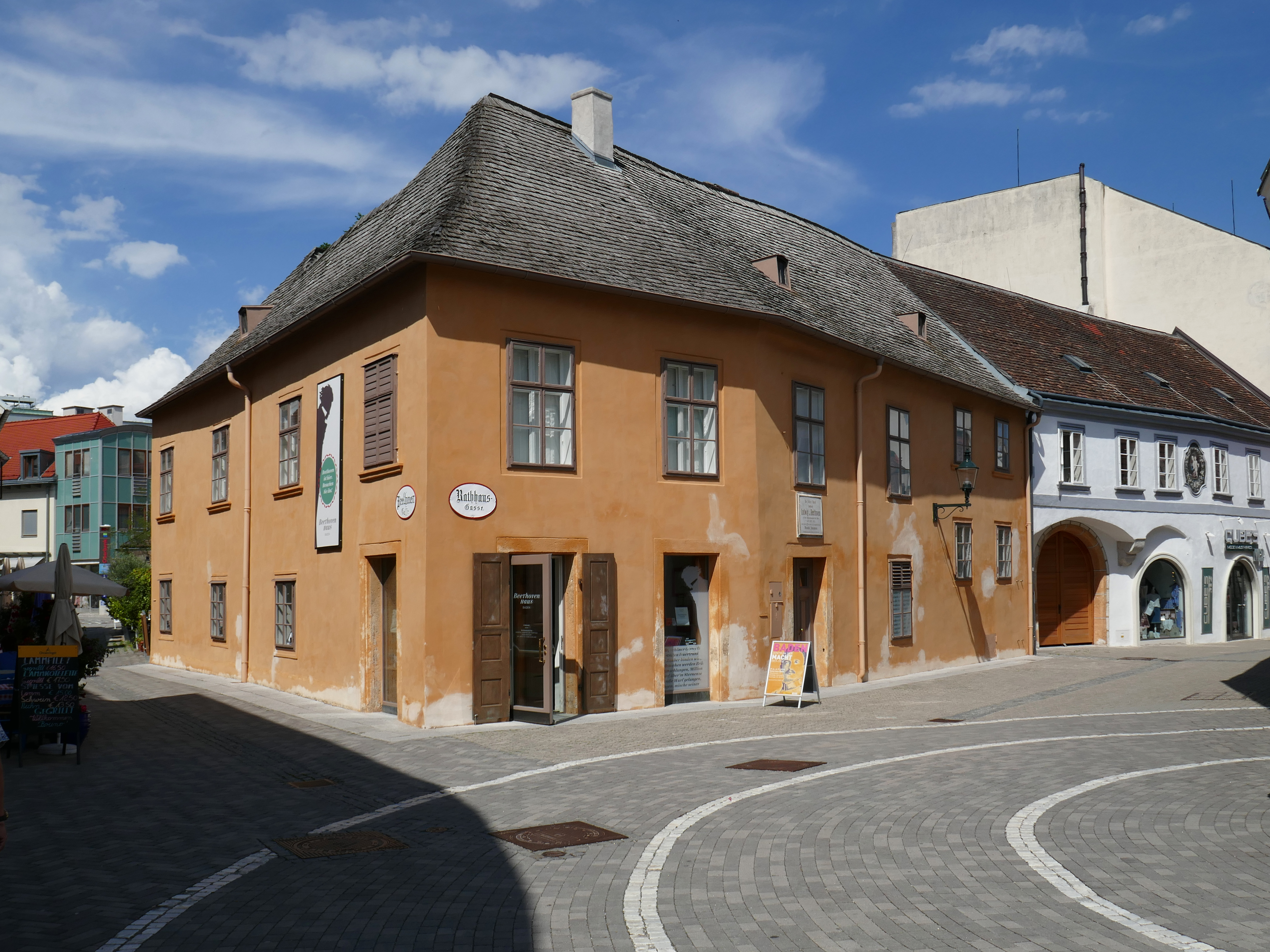 Beethovenhaus, "Haus der Neunten" (Rathausgasse Ecke Beethovengasse) in Baden bei Wien.